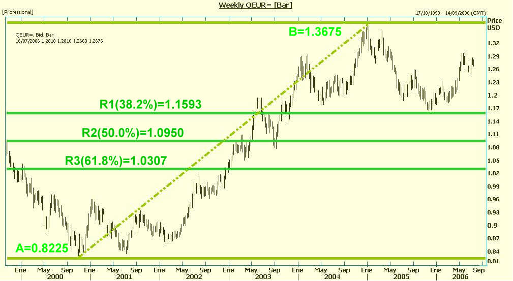 Retrocesos de Fibonacci calculados sobre una gráfica euro/dólar semanal, ene 2000 - julio 2006 trabajo propio, libero todos los derechos (dominio público)